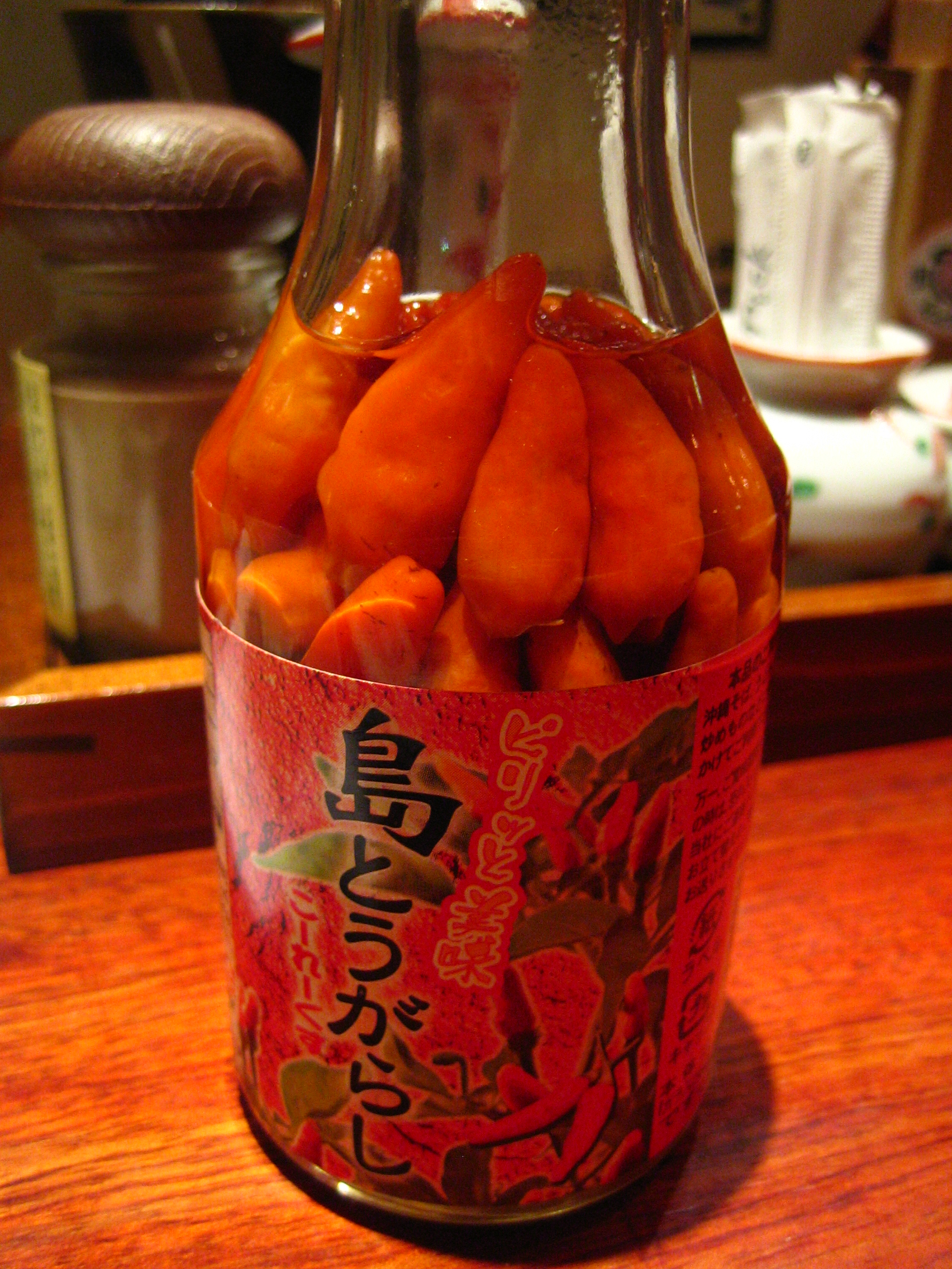 at Mochibuta-ya, Jinbo-cho, Tokyo